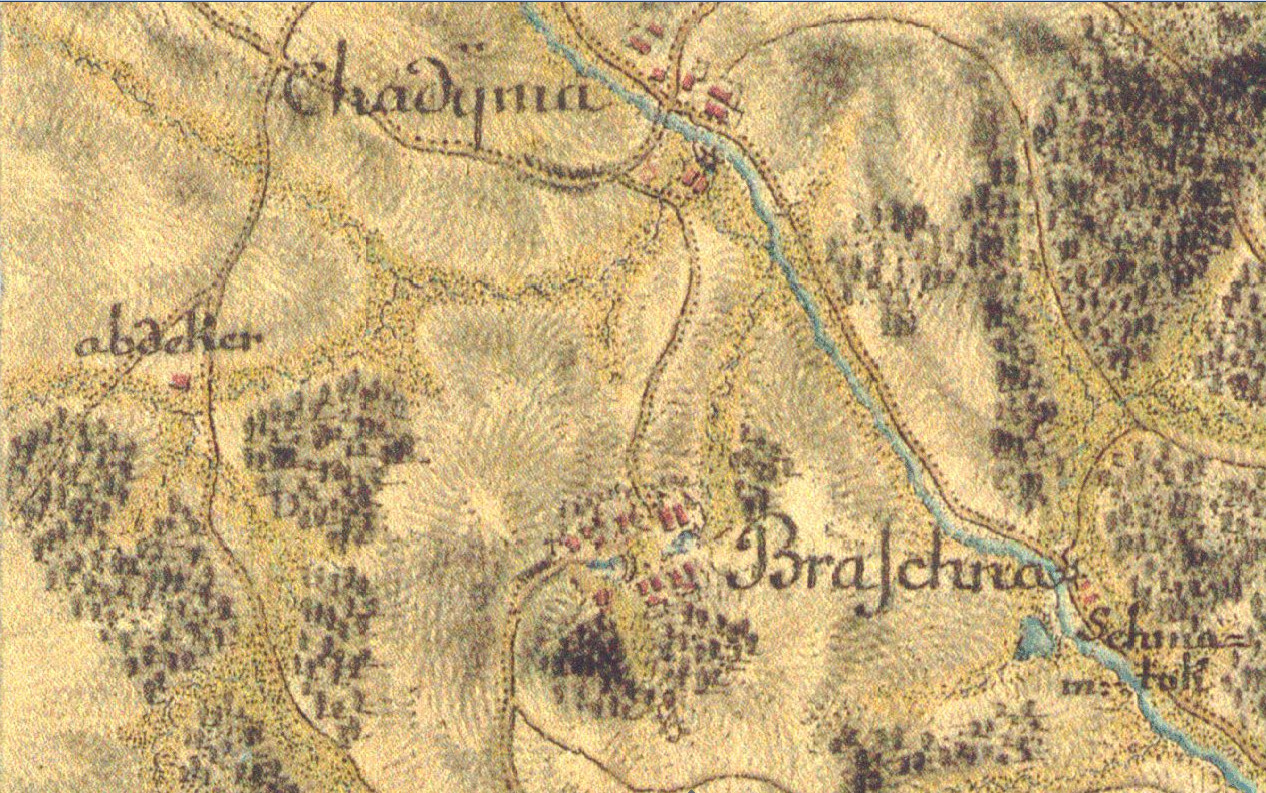 Detail sekce josefského vojenského mapování s obcí Bražnou a okolím